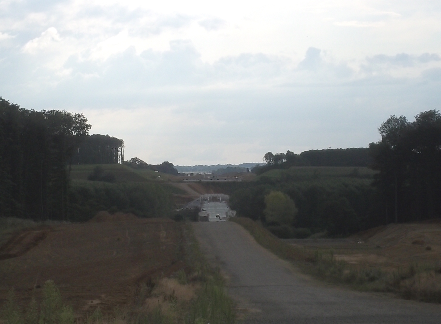 voie LGV bretagne en cour de construction